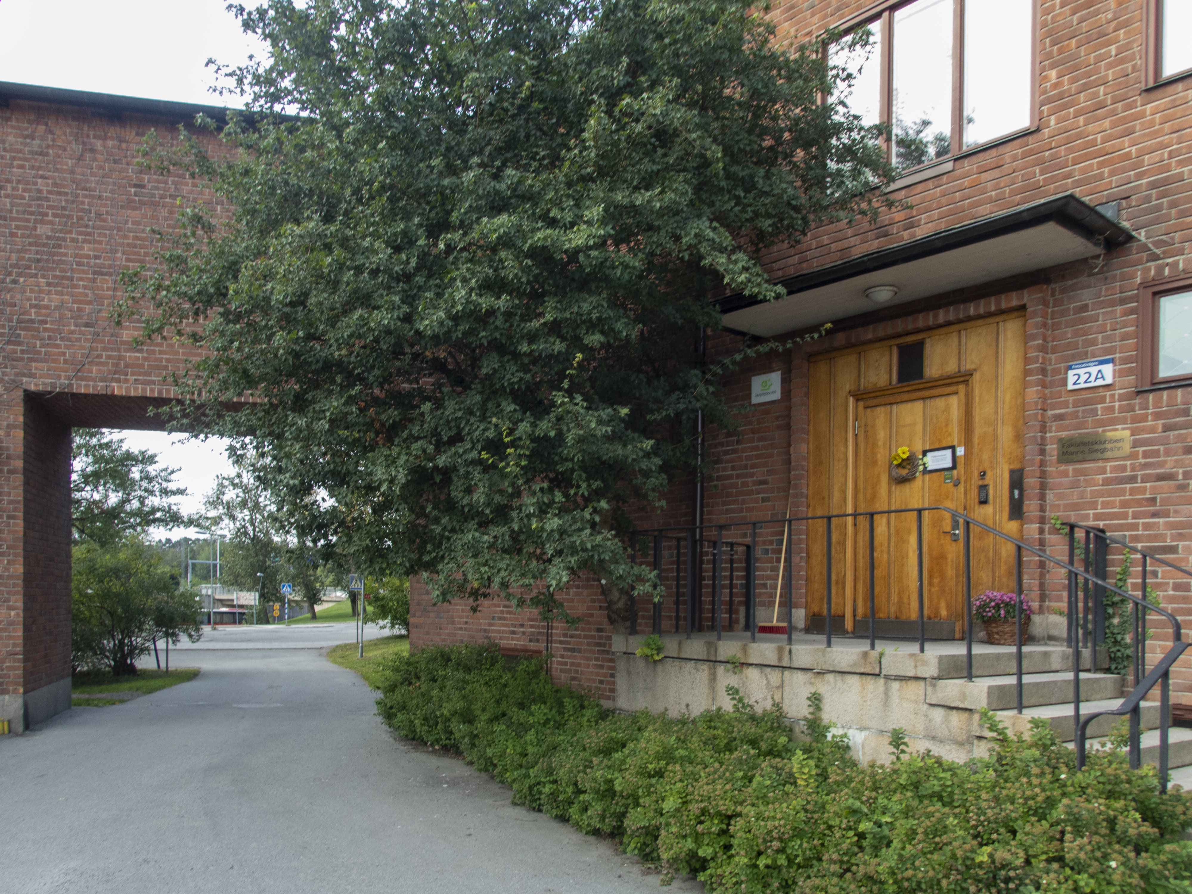 Manne Siegbahnhusen, Frescativägen 22-24 Stockholm. Tidigare Siegbahnlaboratoriet invigt 1936. Arkitekt Gustav Holmdahl